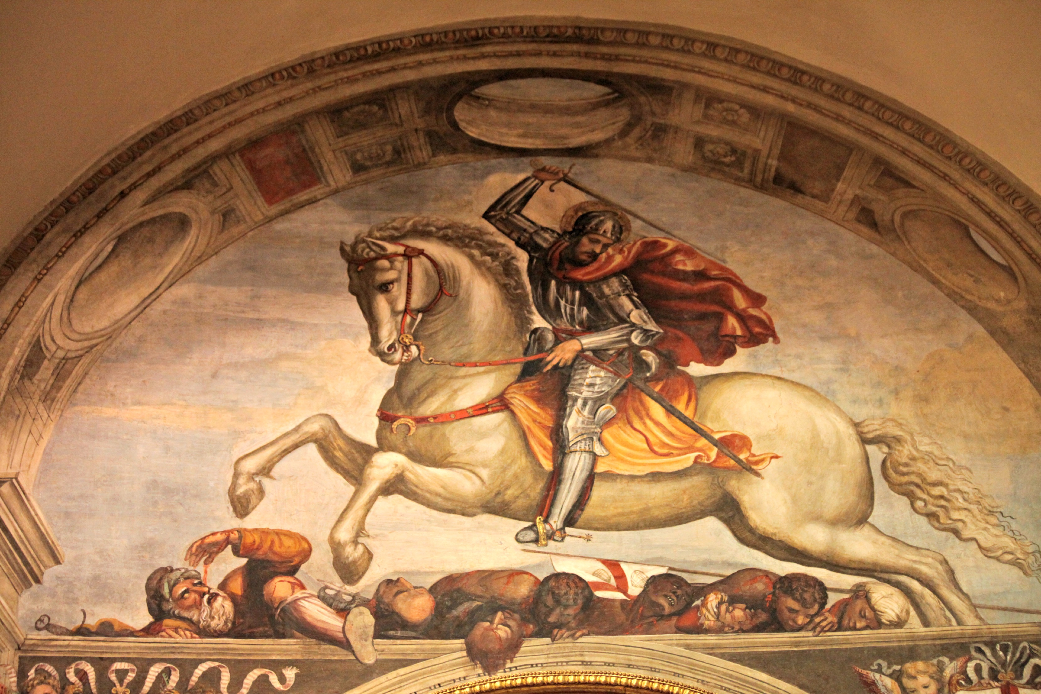 San Jacopo di Compostela che sconfigge i mori di Giovanni Antonio Bazzi detto il Sodoma (Cappella degli Spagnoli)